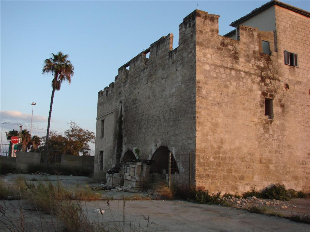 חאן רמת ישי - הפינה הצפון מערבית 1